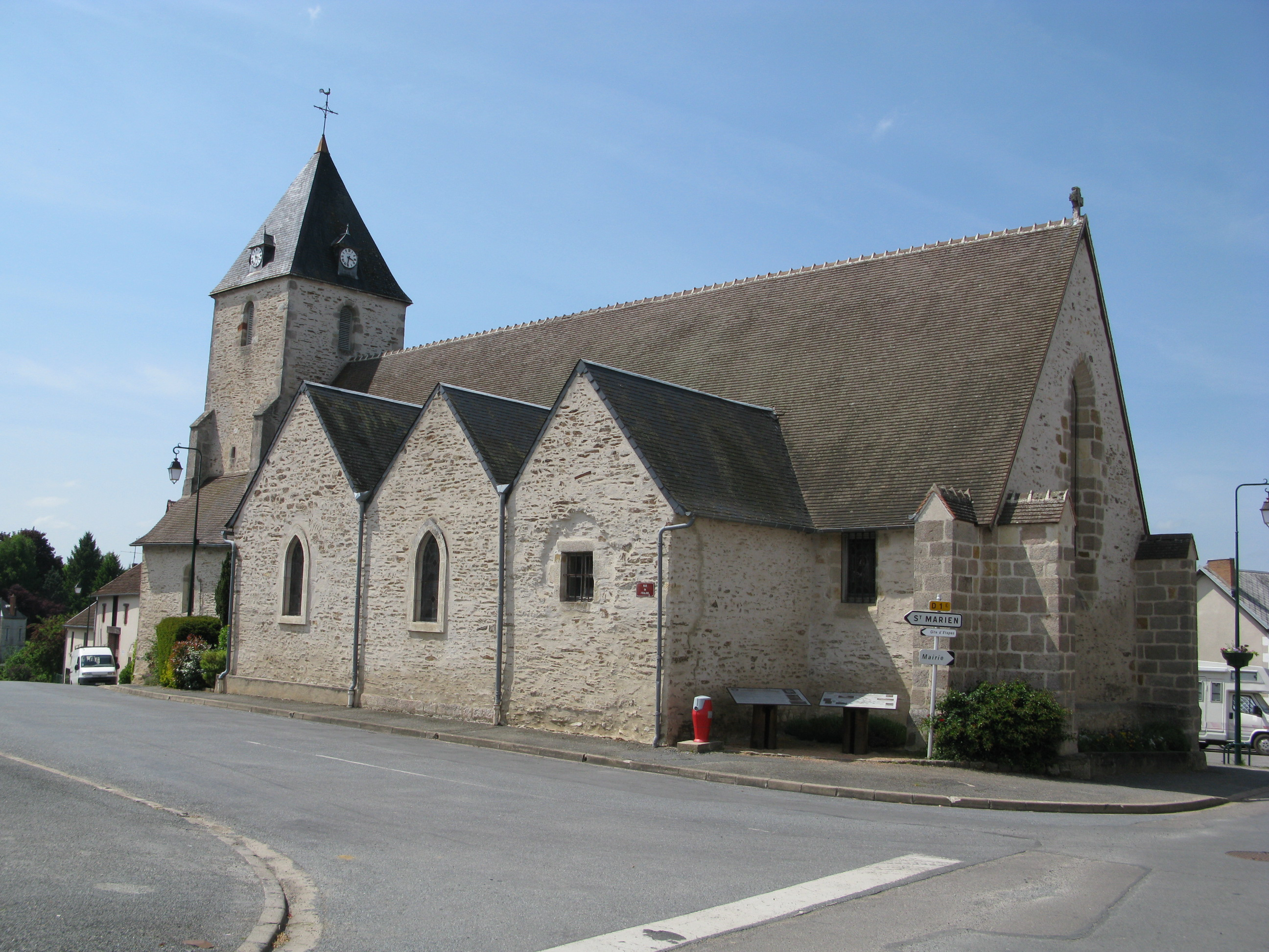 église de Préveranges